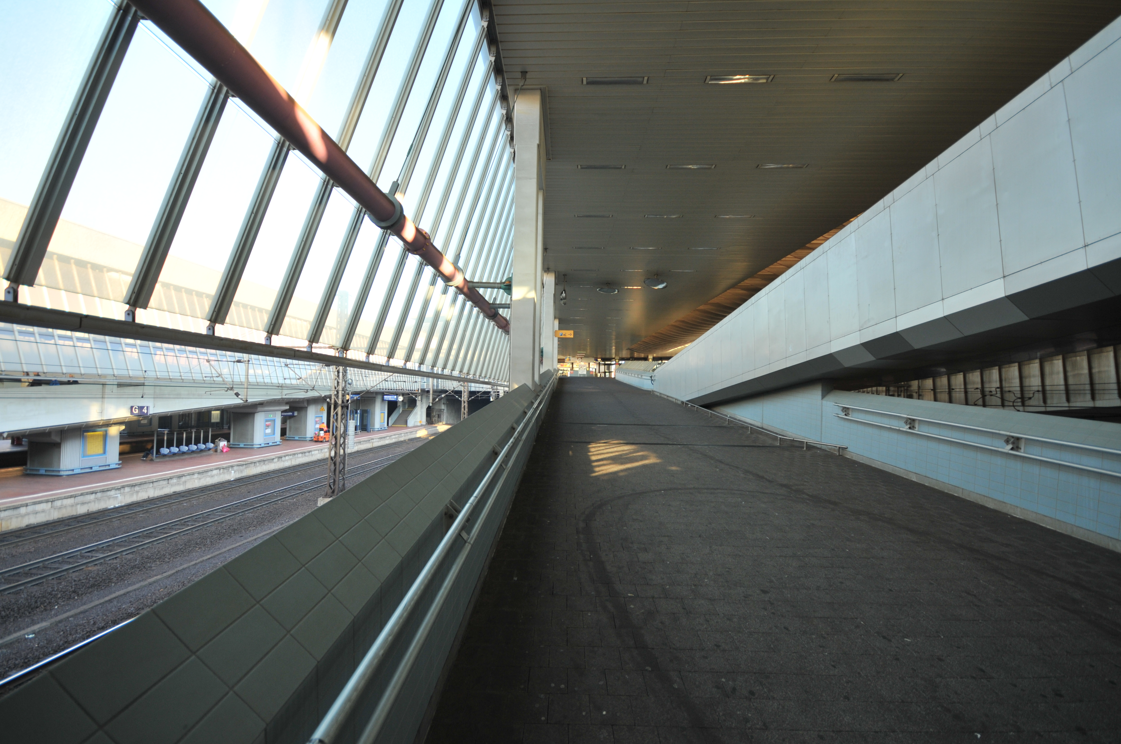 Kassel Bahnhof Wilhelmshöhe